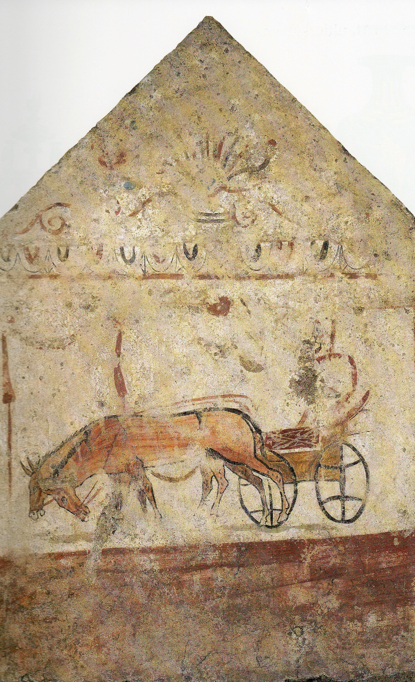 Paestum, Grab des Maultierkarrens. Detail